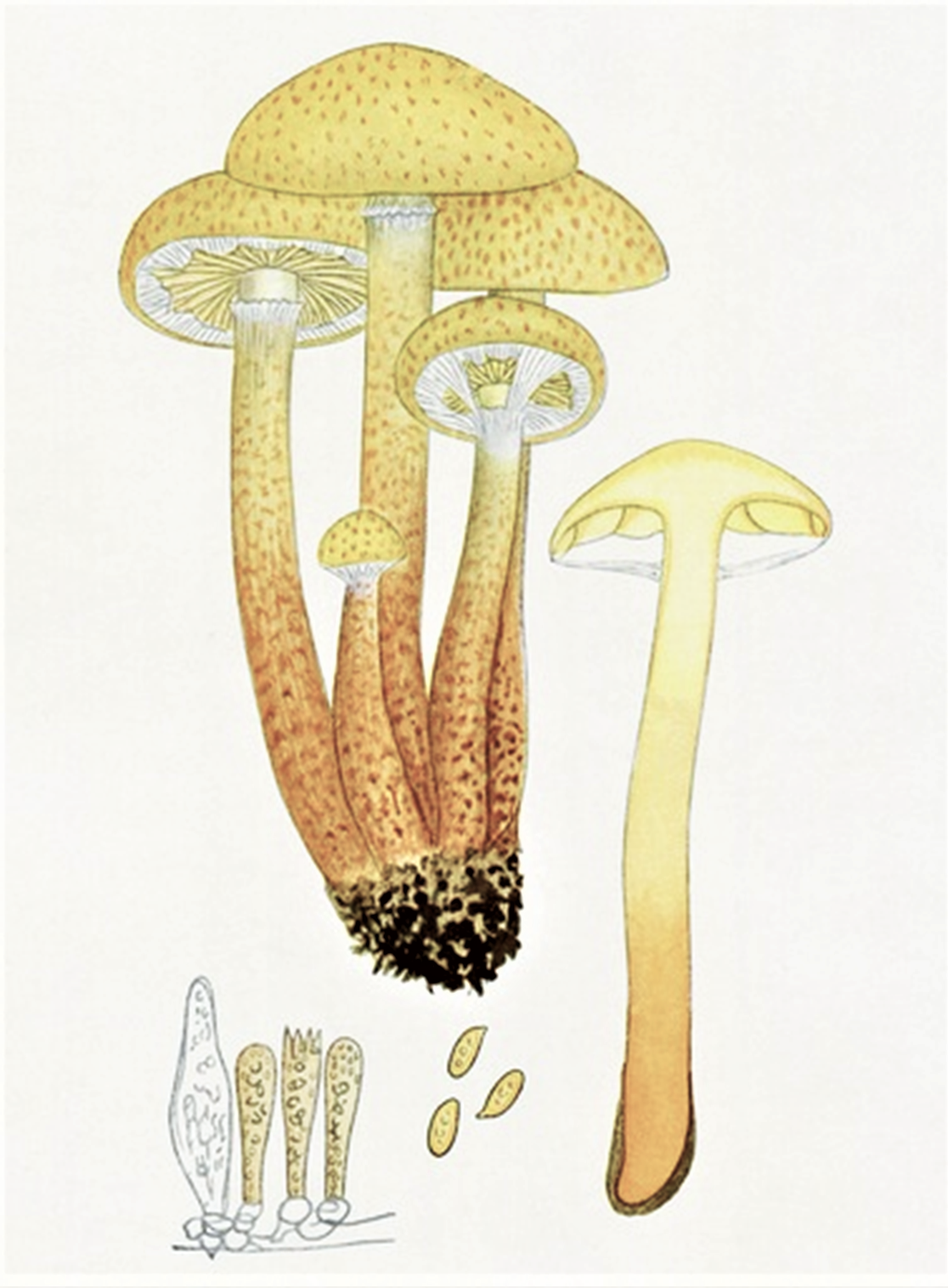 Giacomo Bresadola: Flammula flavida (Schaeff., 1774) P.Kumm. (1871), heute Flammula alnicola (Fr., 1821) P. Kumm. (1871), ehemals auch Pholiota alnicola (Fr., 1821) Singer (1951)